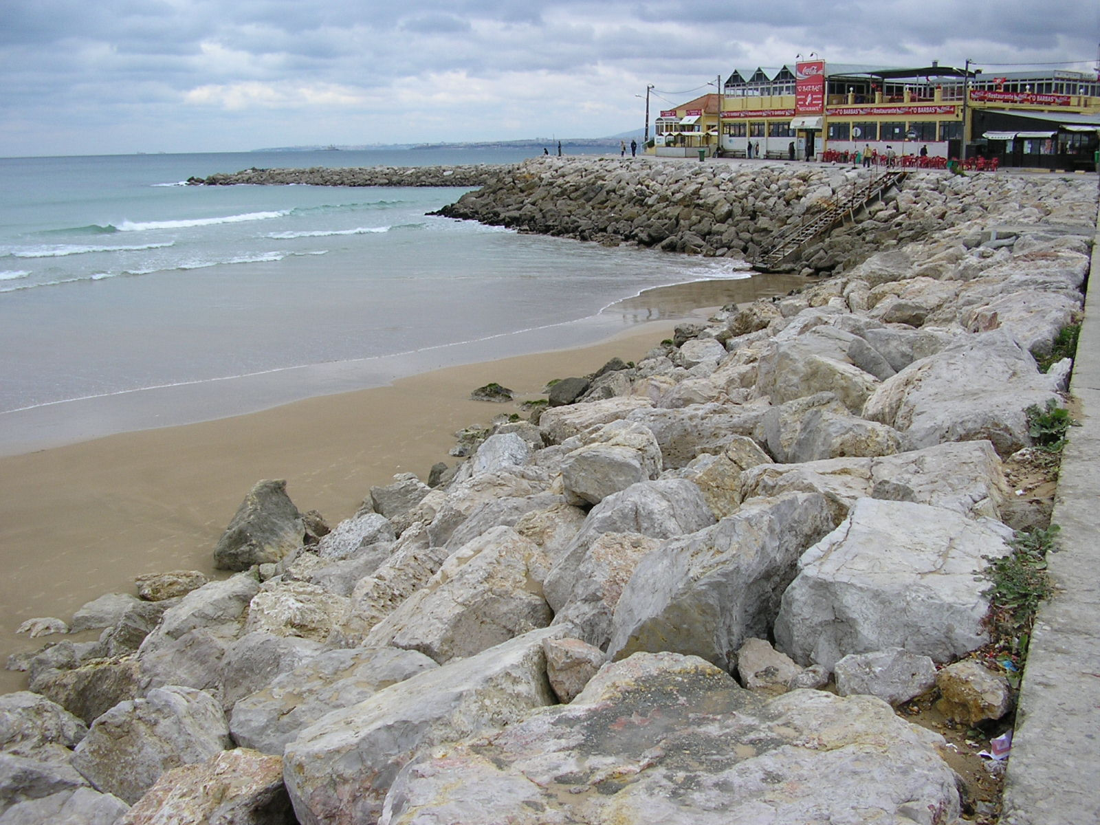 Autore: Massimo De Maria; Descrizione: ristoranti lungo il mare; licenza: CC 2.0